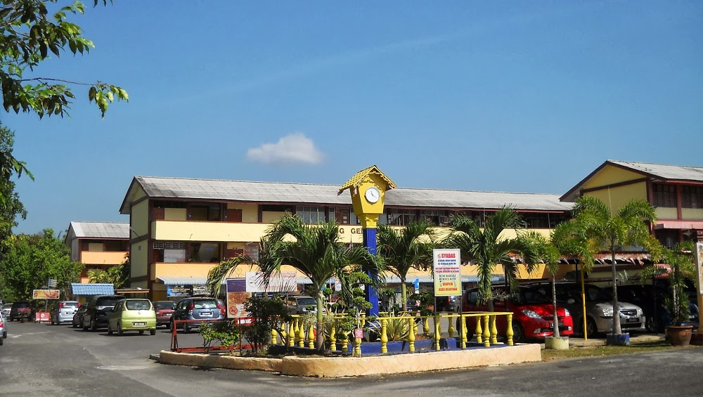 Persekitaran SK Sena